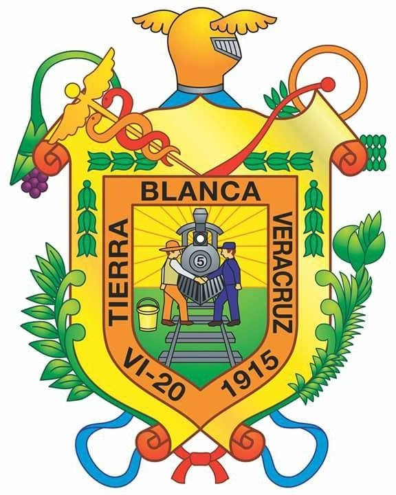 Escudo de armas de la ciudad de Tierra Blanca, Veracruz, México